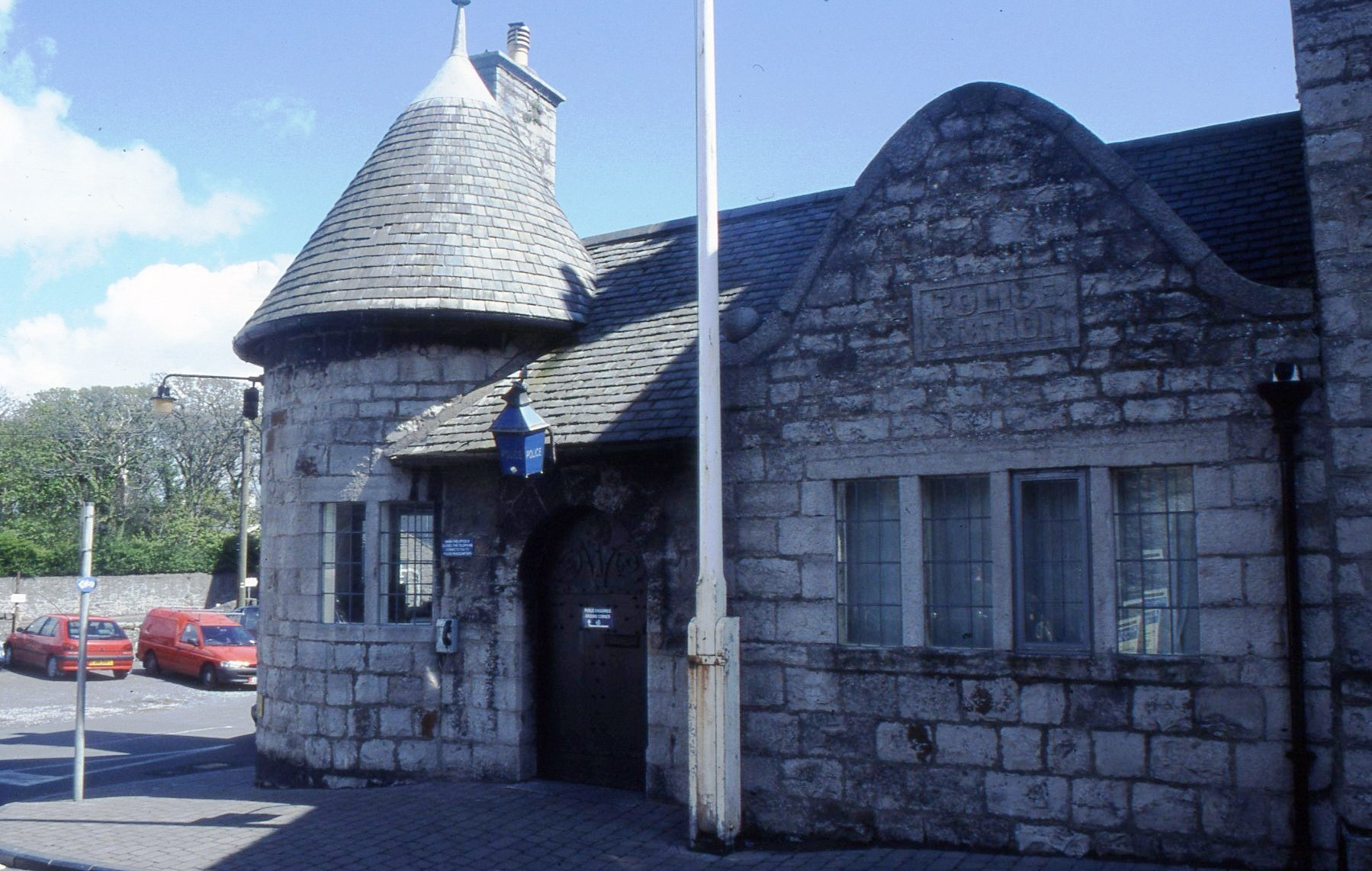 Politie bureau Castletown op Isle of Man